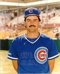 juega al beisbol